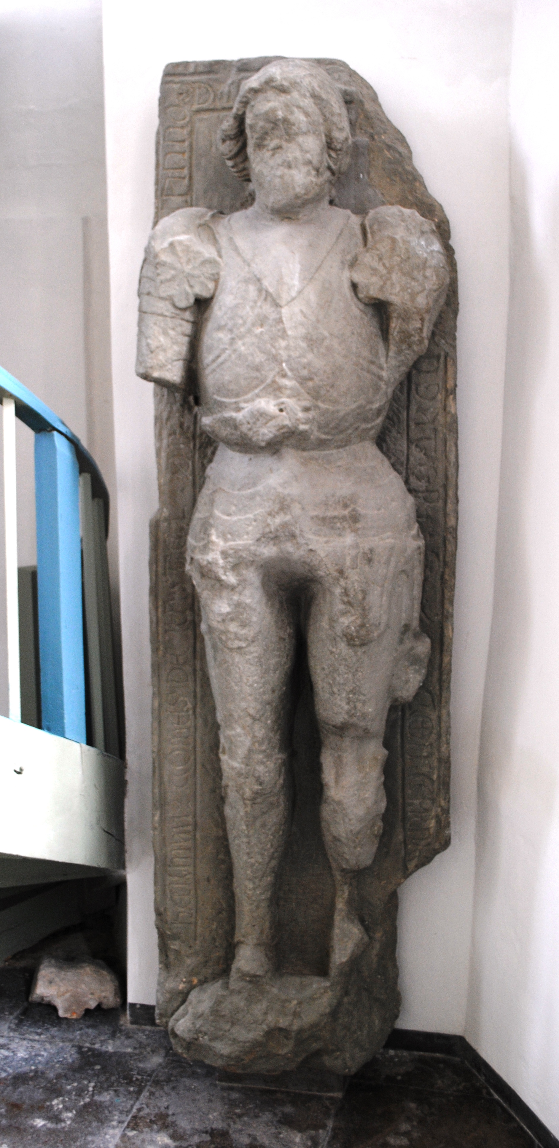 Kirche Rüdenhausen, Epithaph für Hermann I. zu Castell, um 1258, Umschrift: „† ANNO • DNI • M • CCL ... [FUN]DATOR • S • CON[VENTUS] CARM ... HERMAN • COMES • DE • KASTEL • OB[IIT]“ This is a photograph of an architectural monument.